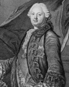 Friedrich Wilhelm Graf von Ellrodt(-Reipoltskirchen) zu Neudrossenfeld, Gesandter des Markgrafentums Bayreuth zum Kaiserlichen Hof in Wien und zum Reichstag in Regensburg (* 24. August 1737; + 23. Mai 1765)